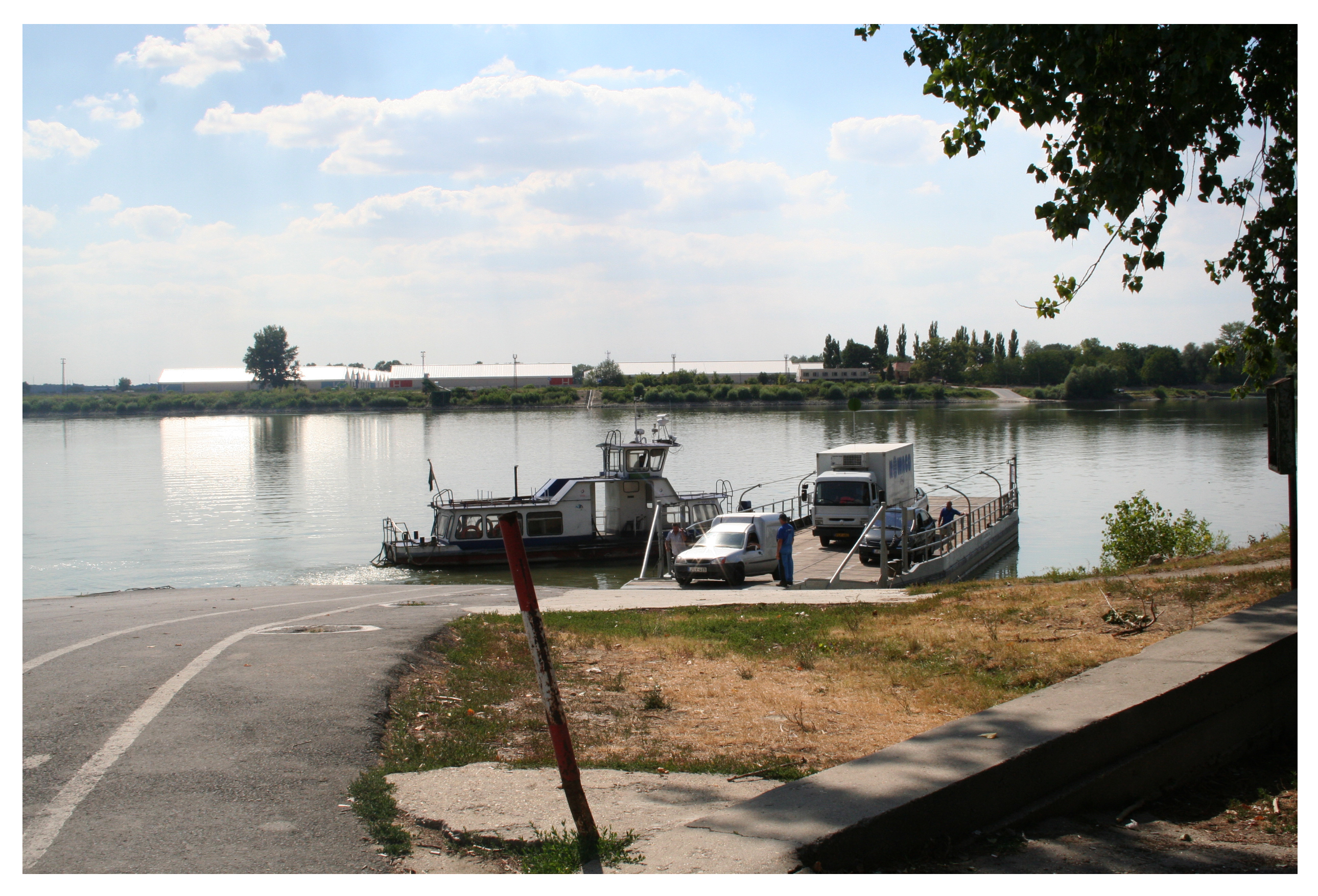 Donau